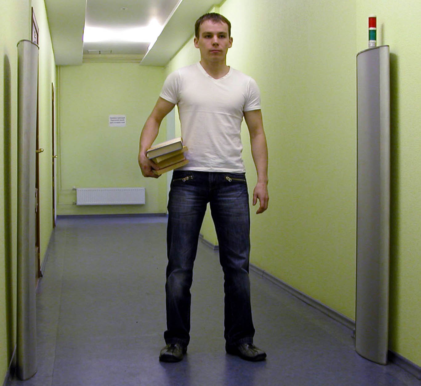 rfid-reader(portal)